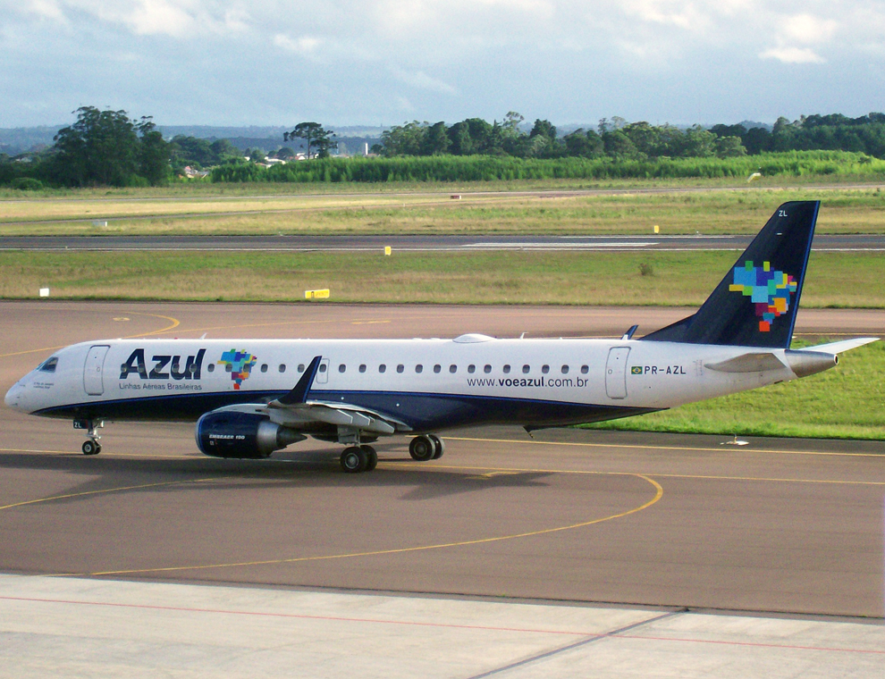 EMB 190 PR-AZL